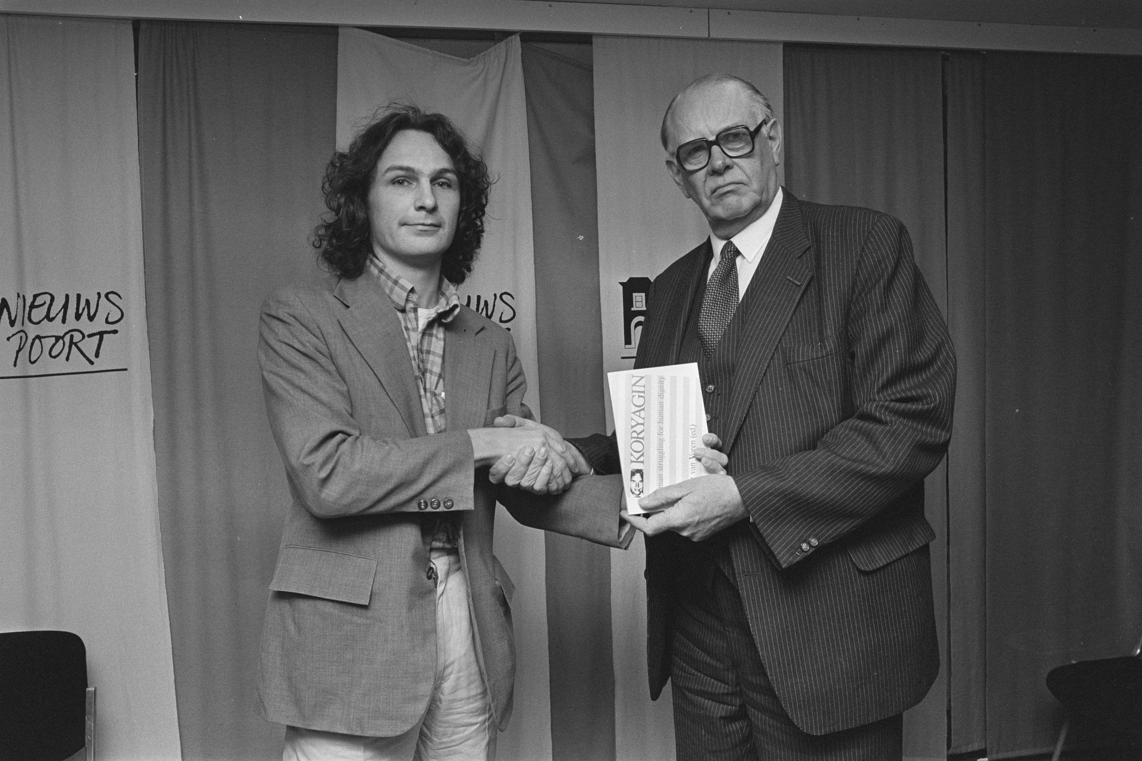 Collectie / Archief : Fotocollectie Anefo Reportage / Serie : [ onbekend ] Beschrijving : Prof. Bastiaans krijgt eerste exemplaar van het boek van eindredacteur Robert van Voren (l) Datum : 30 januari 1987 Trefwoorden : boeken, exemplaren, overhandigingen Fotograaf : Gerrits, Roland / Anefo Auteursrechthebbende : Nationaal Archief Materiaalsoort : Negatief (zwart/wit) Nummer archiefinventaris : bekijk toegang 2.24.01.05 Bestanddeelnummer : 933-8760